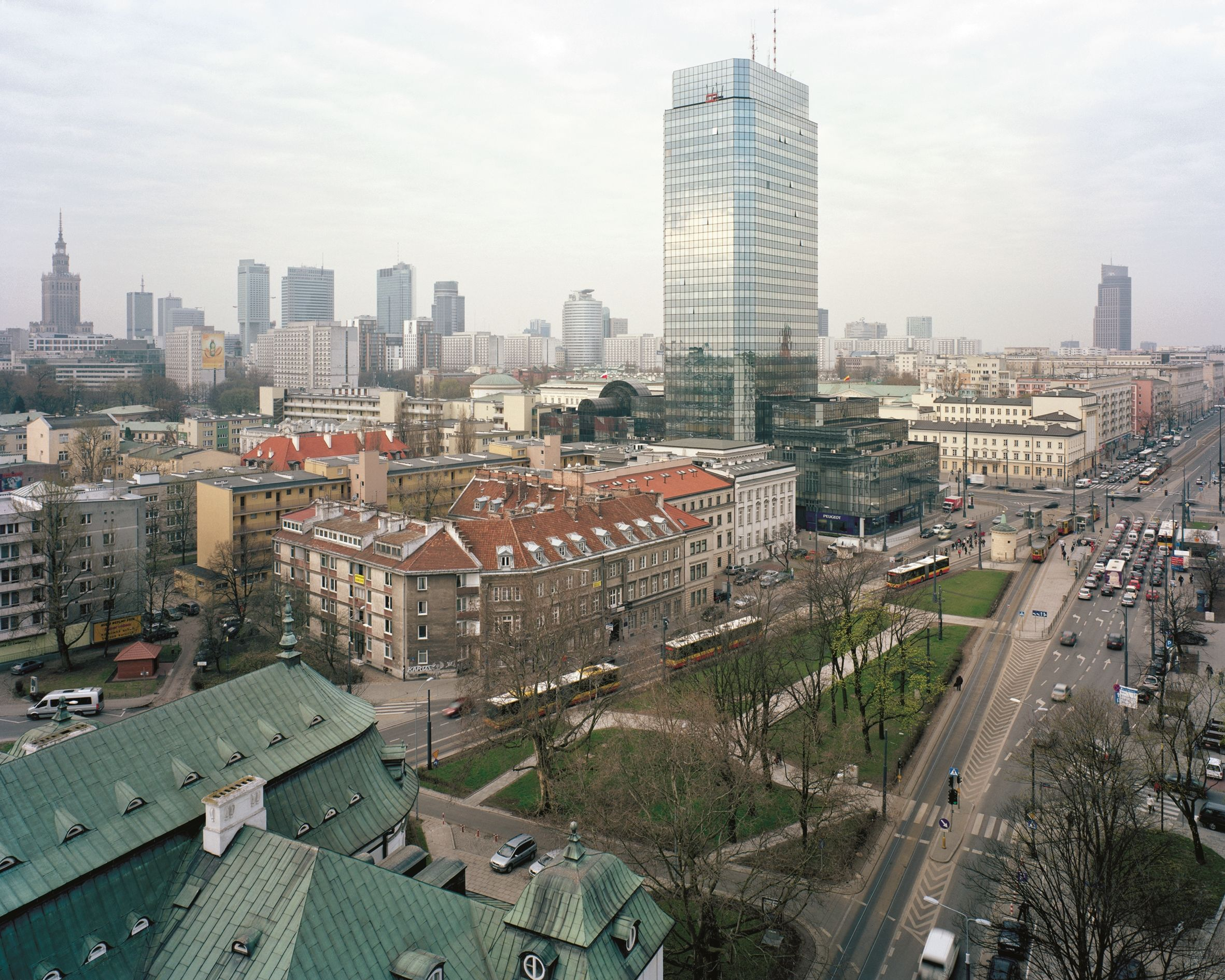 Elżbieta Janicka, Wojciech Wilczyk - Inne Miasto. Duże getto. Widok z alei Solidarności 64 w kierunku południowo-zachodnim — 15 kwietnia 2011